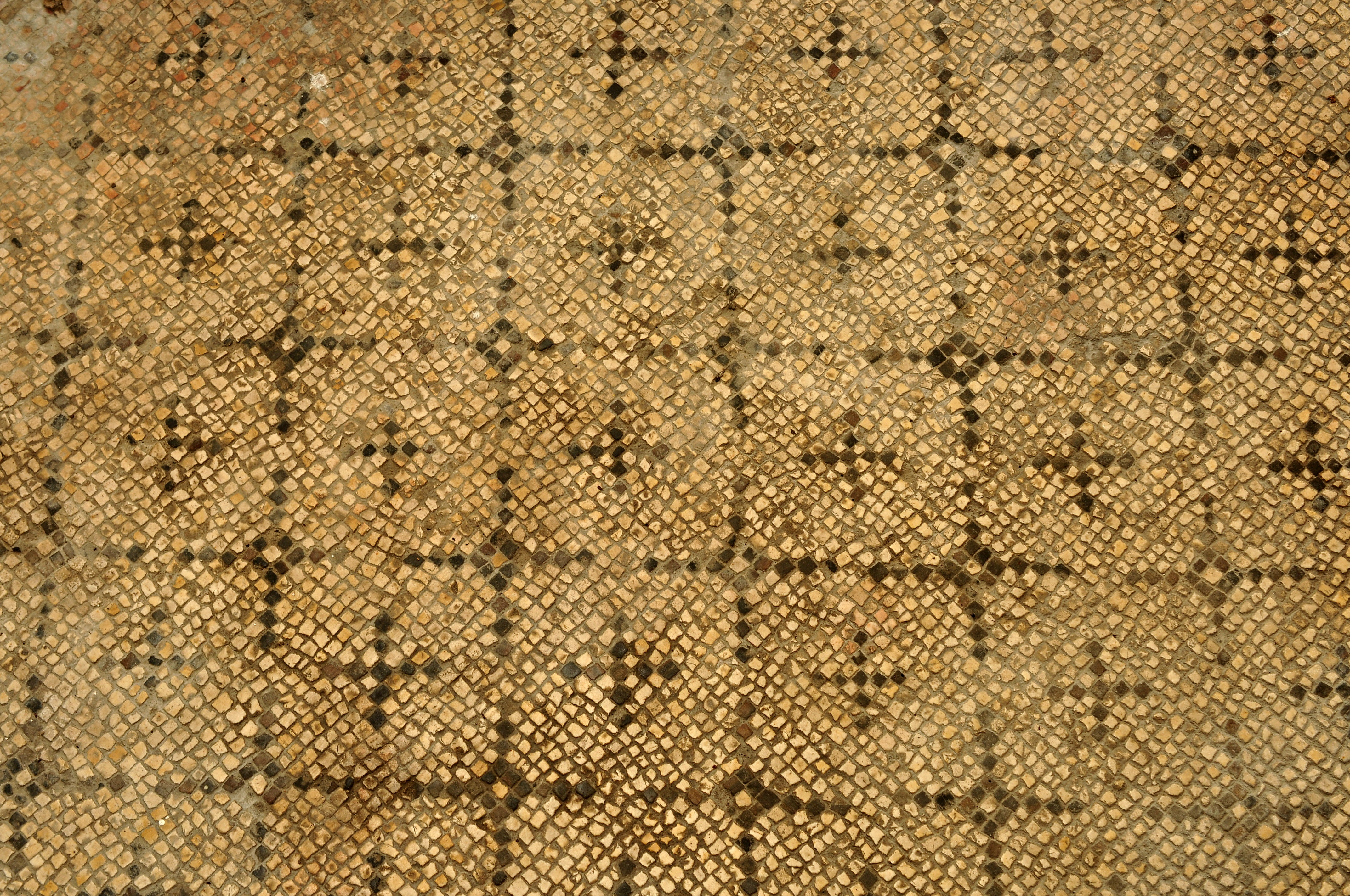 Herrenhaus A, römischer Gutshof «Seeb» in Winkel bei Bülach (Switzerland)